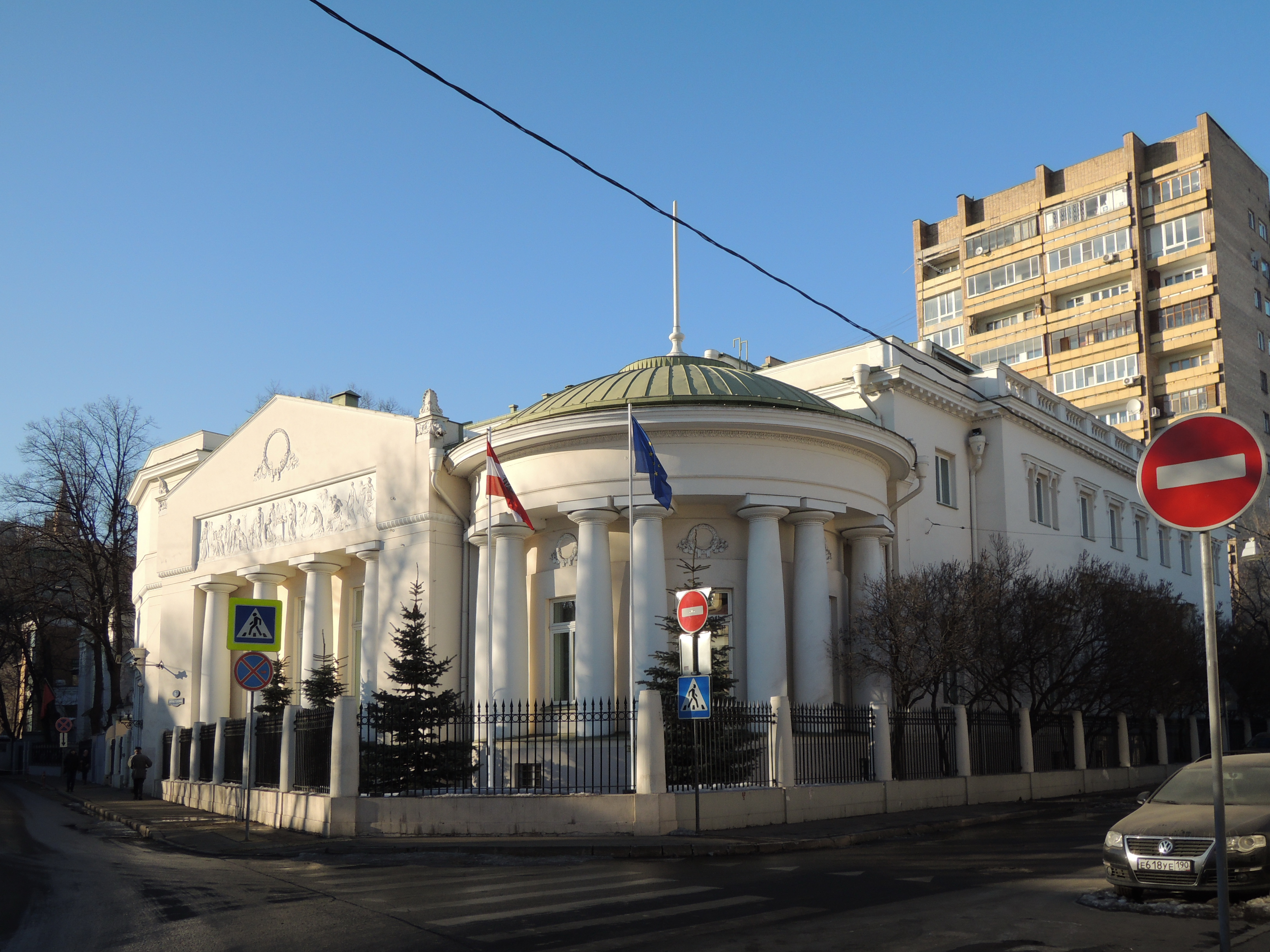 Dom Mindovskogo